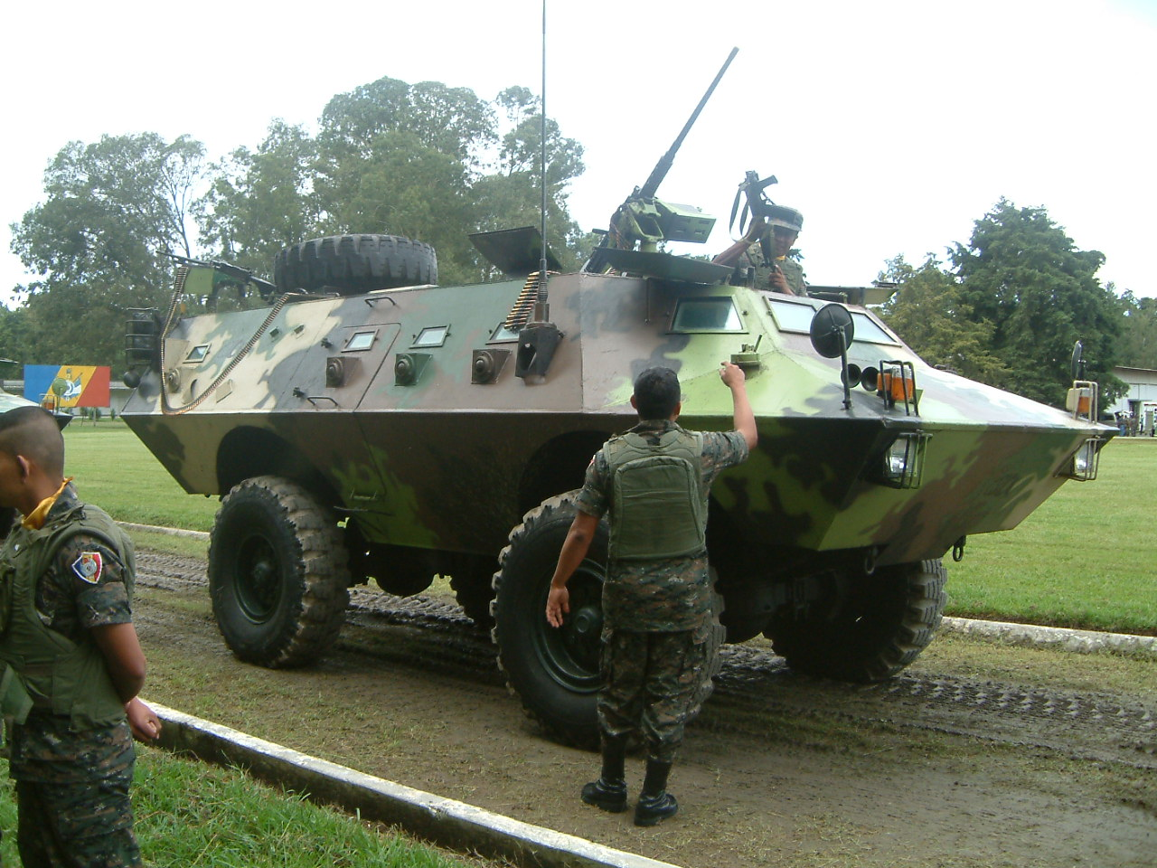 armadillo apc